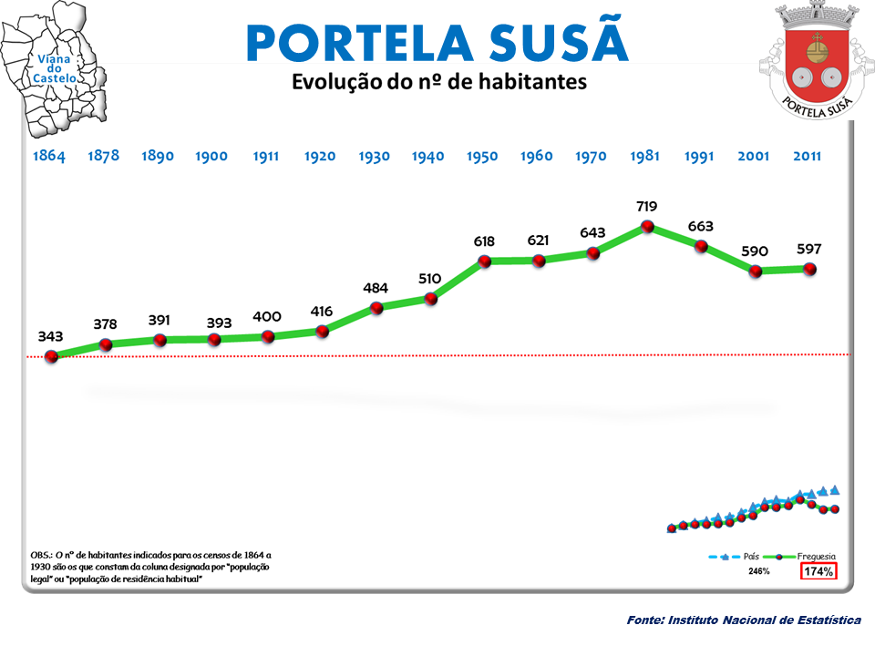 Censos 1864/2011